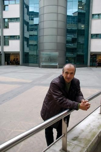 Jose Ramon Etxebarria irakaslea